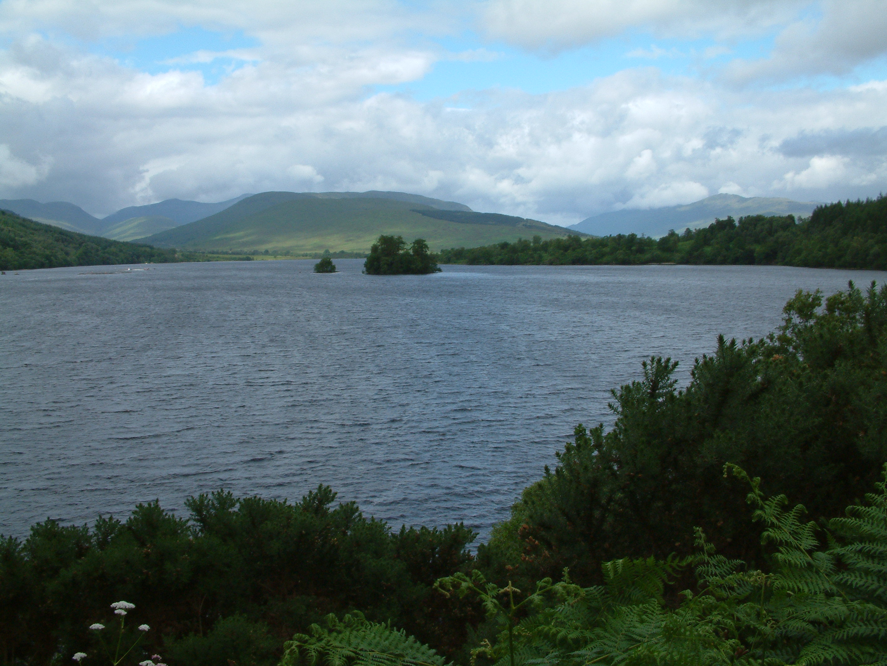 own work, StaraBlazkova 2006